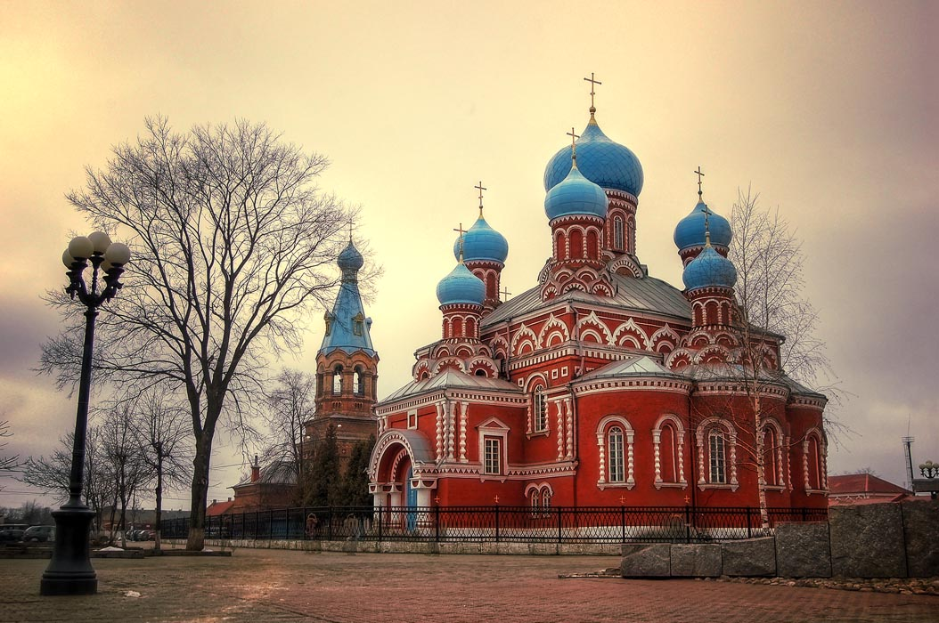 Беларуская (тарашкевіца): Ансамбль Васкрасенскага сабору:Васкрасенскі саборзваніца. г. Барысаў This is a photo of Belarusian heritage monument. Reference number: 613Г000004 ( WLM)